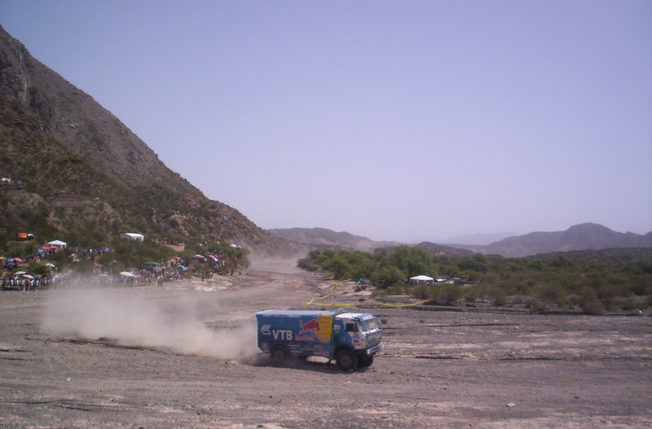 Categoría camiones del Rally Dakar 2010, en su paso por la provincia de San Juan (ARG). Conductores: Ilgizar Mardeev (RUS), Viatcheslav Mizyukaev (RUS) y Andrey Karginov (RUS); camión Kamaz 4326 (#505)